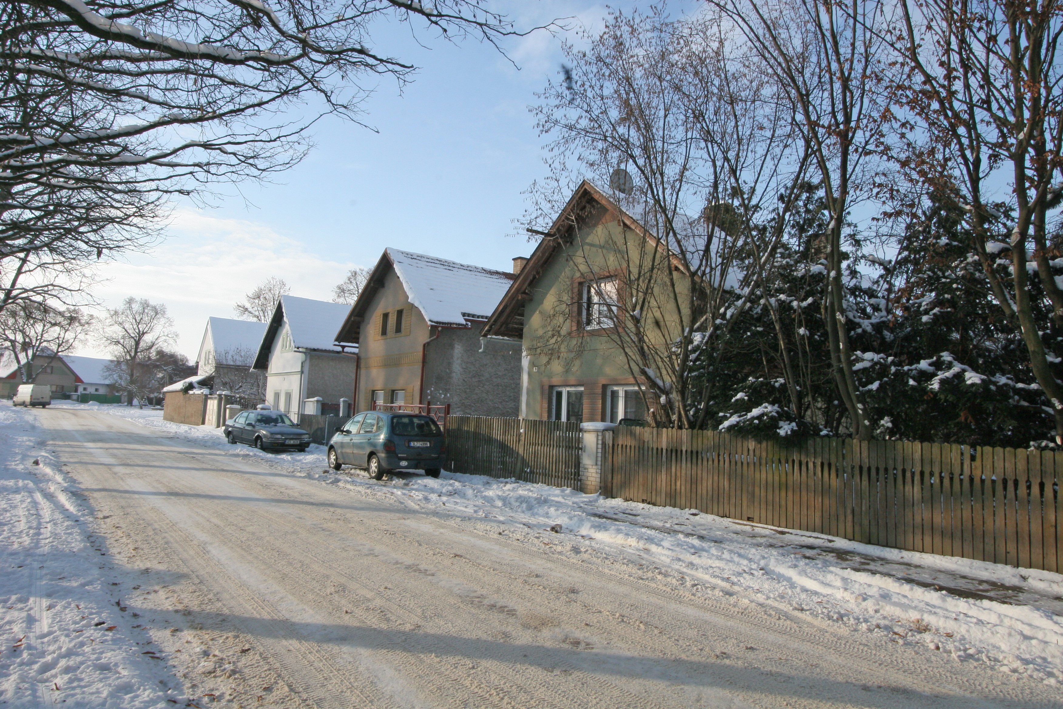 Městec domy čp. 31, 32, 34